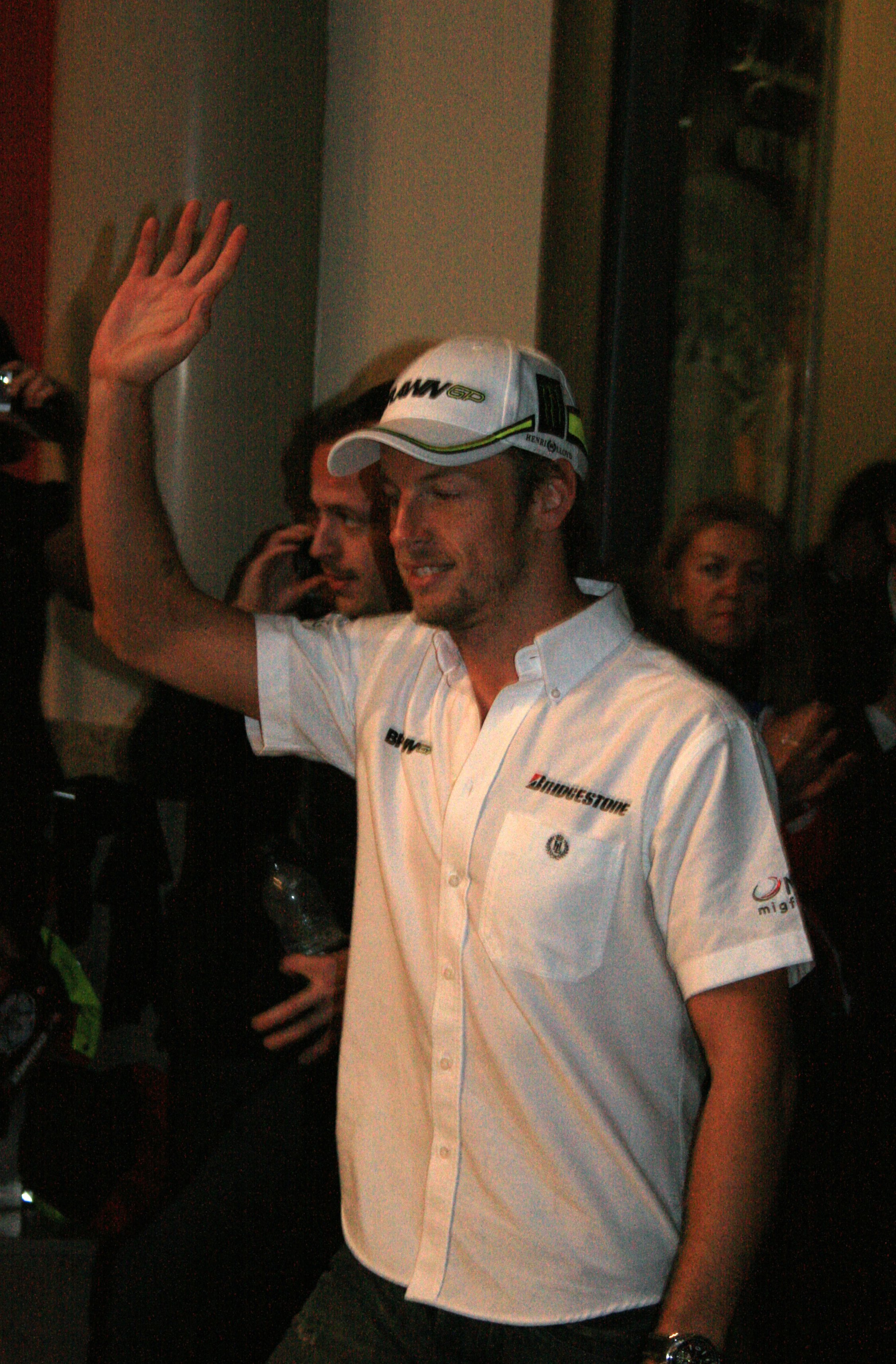 Jenson Button in 2009